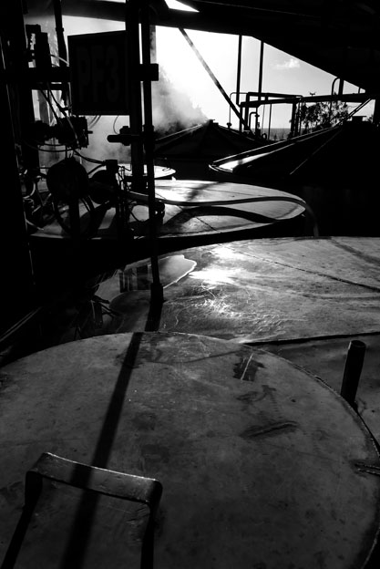 atelier de fermentation Distillerie de Savannaa